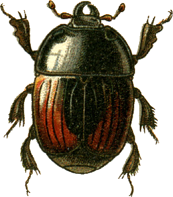 This file has been extracted from another file: Jacobs17.jpg